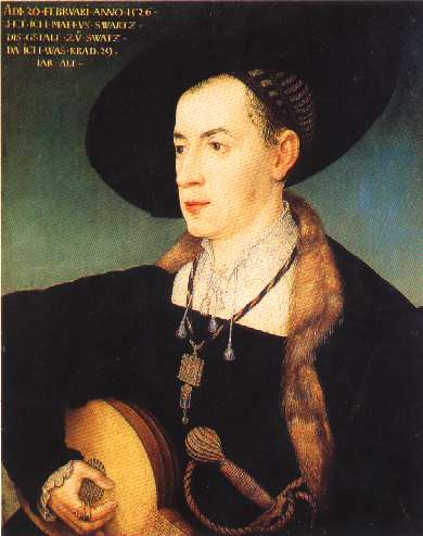 portait de Mathäus_Schwartz